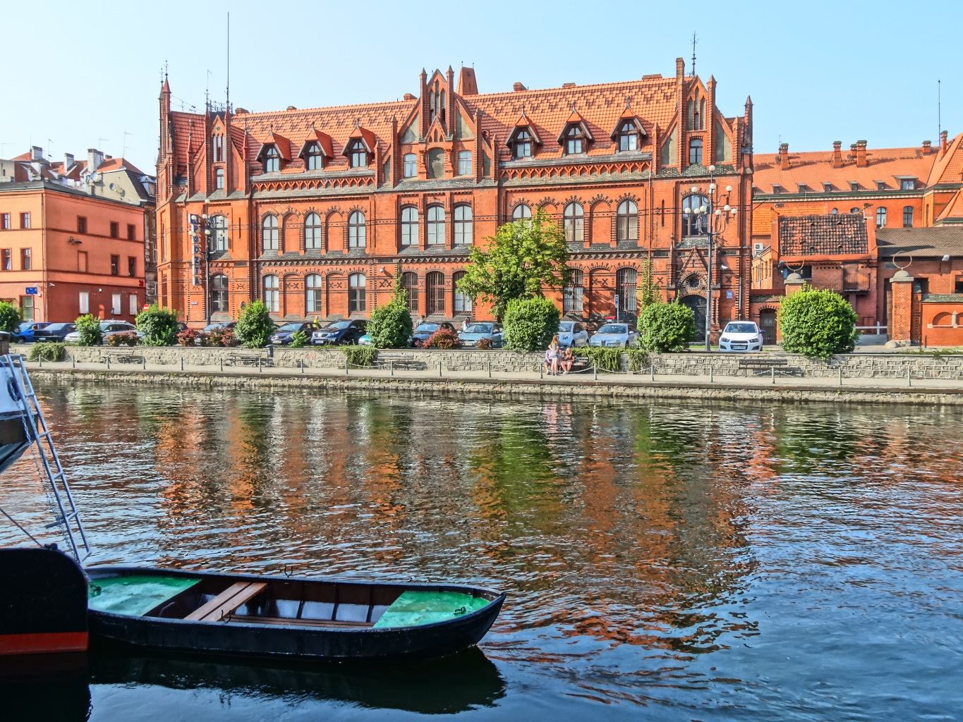 Budynek Poczty Głównej w Bydgoszczy przy ul. Jagiellońskiej (zbud. 1883 skrzydło płd, 1899 skrzydło płn)